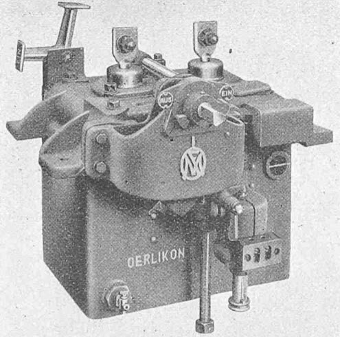 Schalter für die Zugsammelschiene einer SBB Ce 6/8 II (Krokodil-Lokomotive)